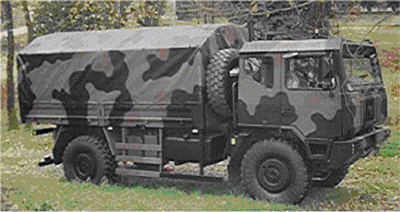 Autocarro tattico leggero aviotrasportabile 4x4, Esercito Italiano